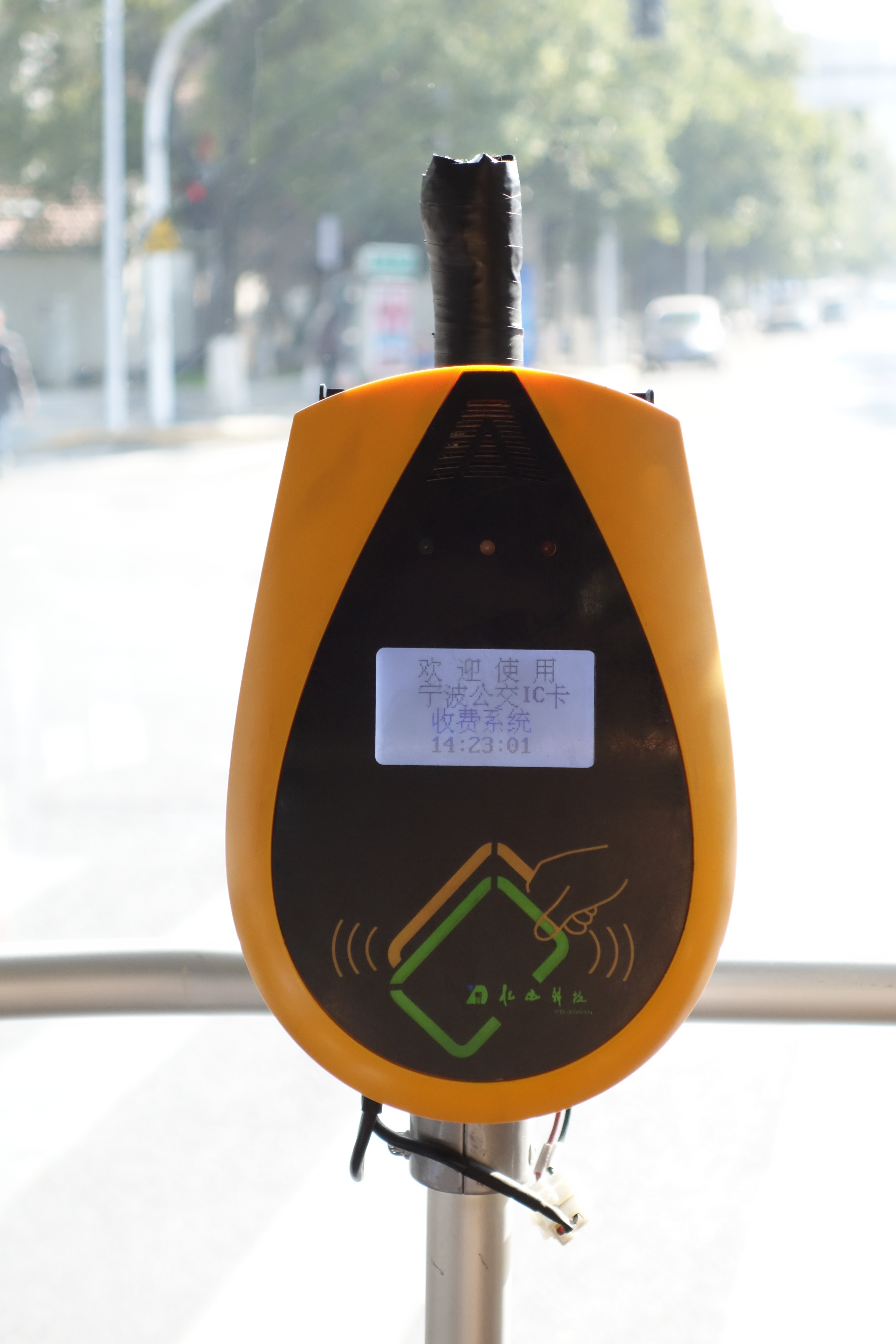 一台甬城通刷卡机